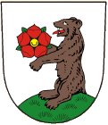 znak města Horní Planá